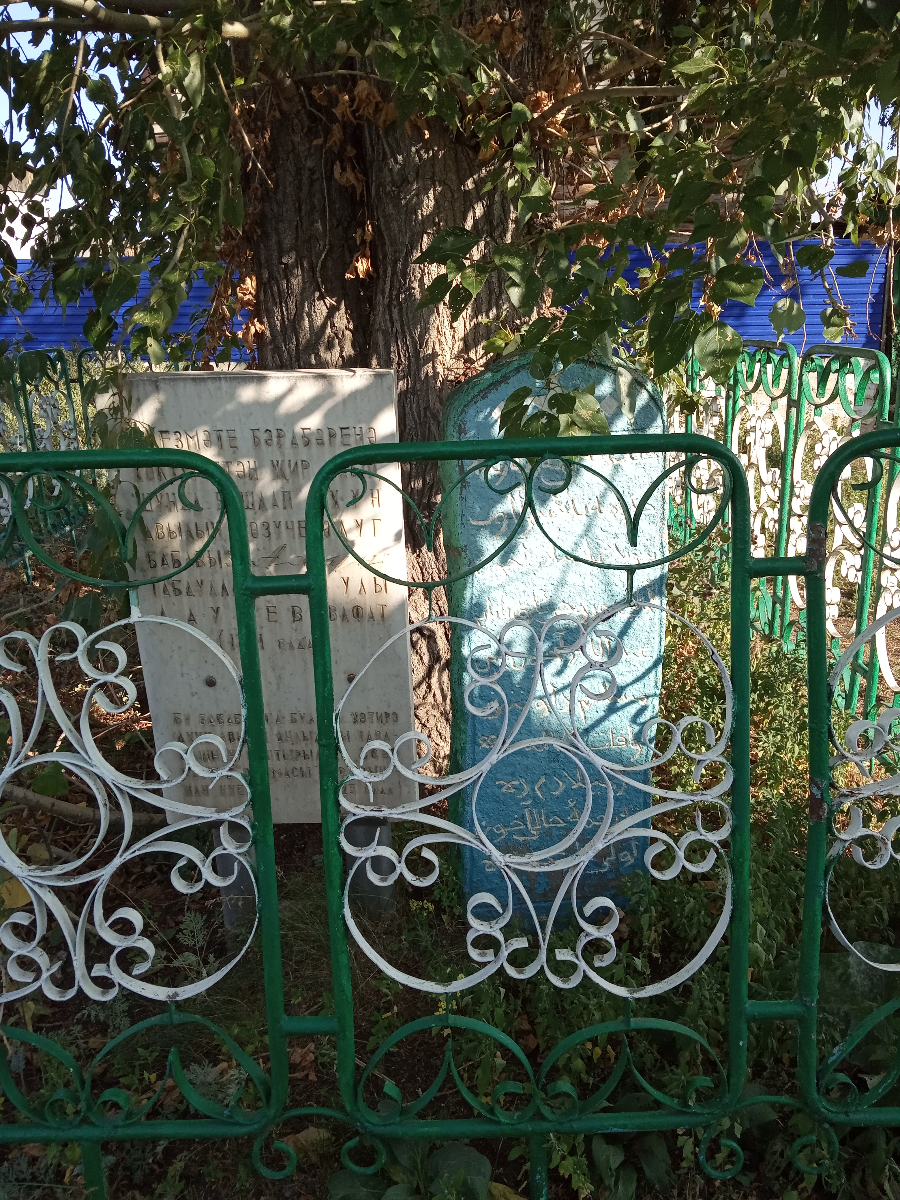 Башҡортса: Учалы районы Ахун ауылы